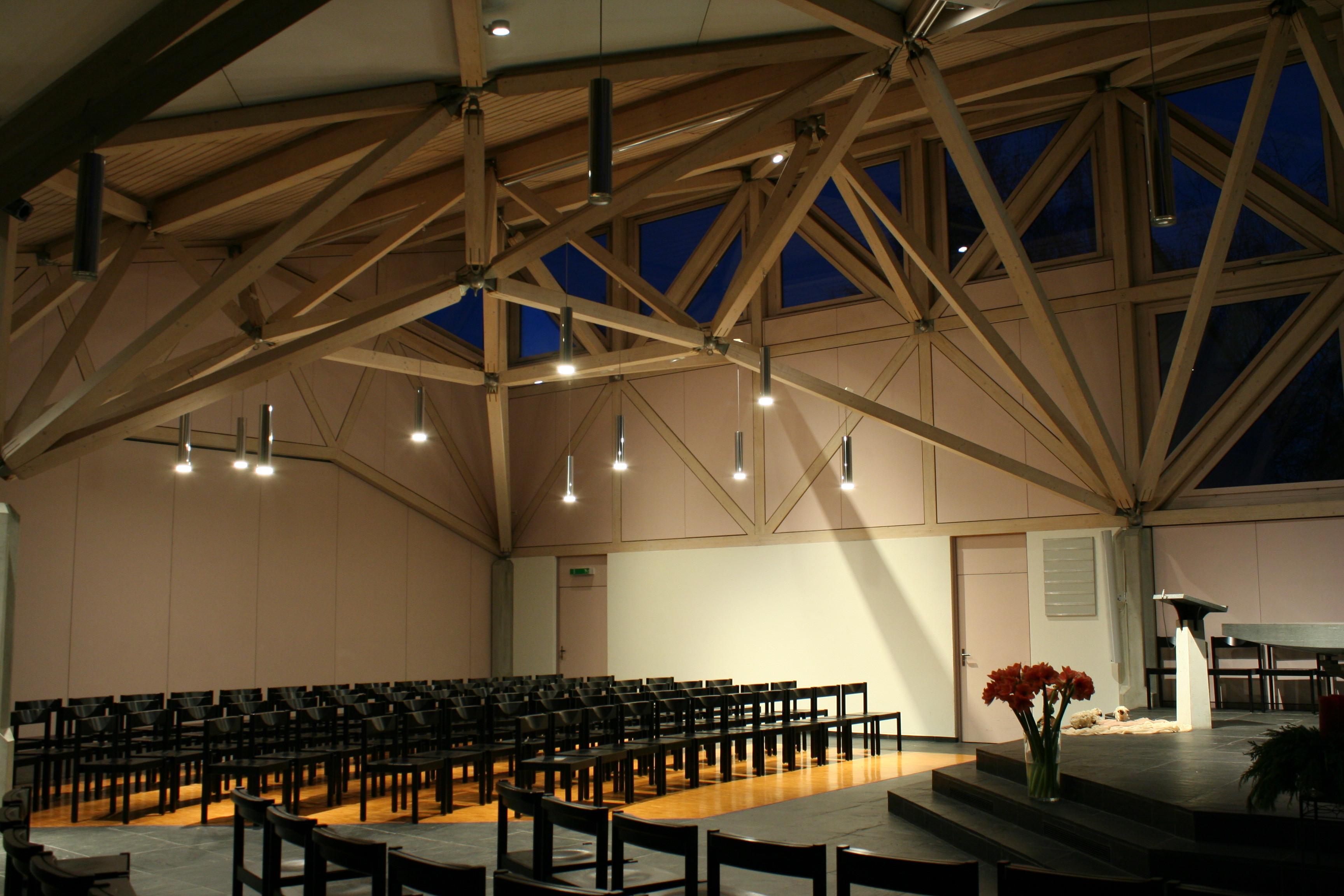 Römisch-katholische Kirche St. Katharina von Siena Fällanden, Innenansicht in der Nacht